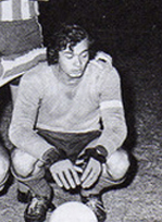 Carlos Munutti, futbolista de Rosario Central en los años 1970.